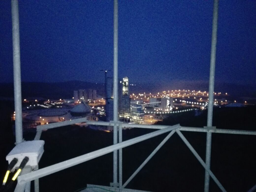 vista de la planta desde torre de telcel